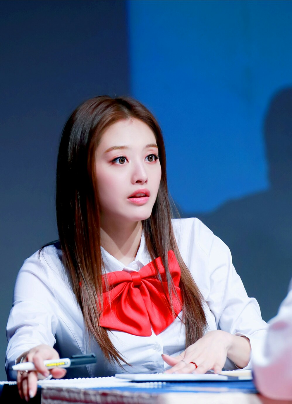 160313 레인보우 신촌 팬싸인회 재경